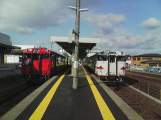 JR久慈駅ホーム